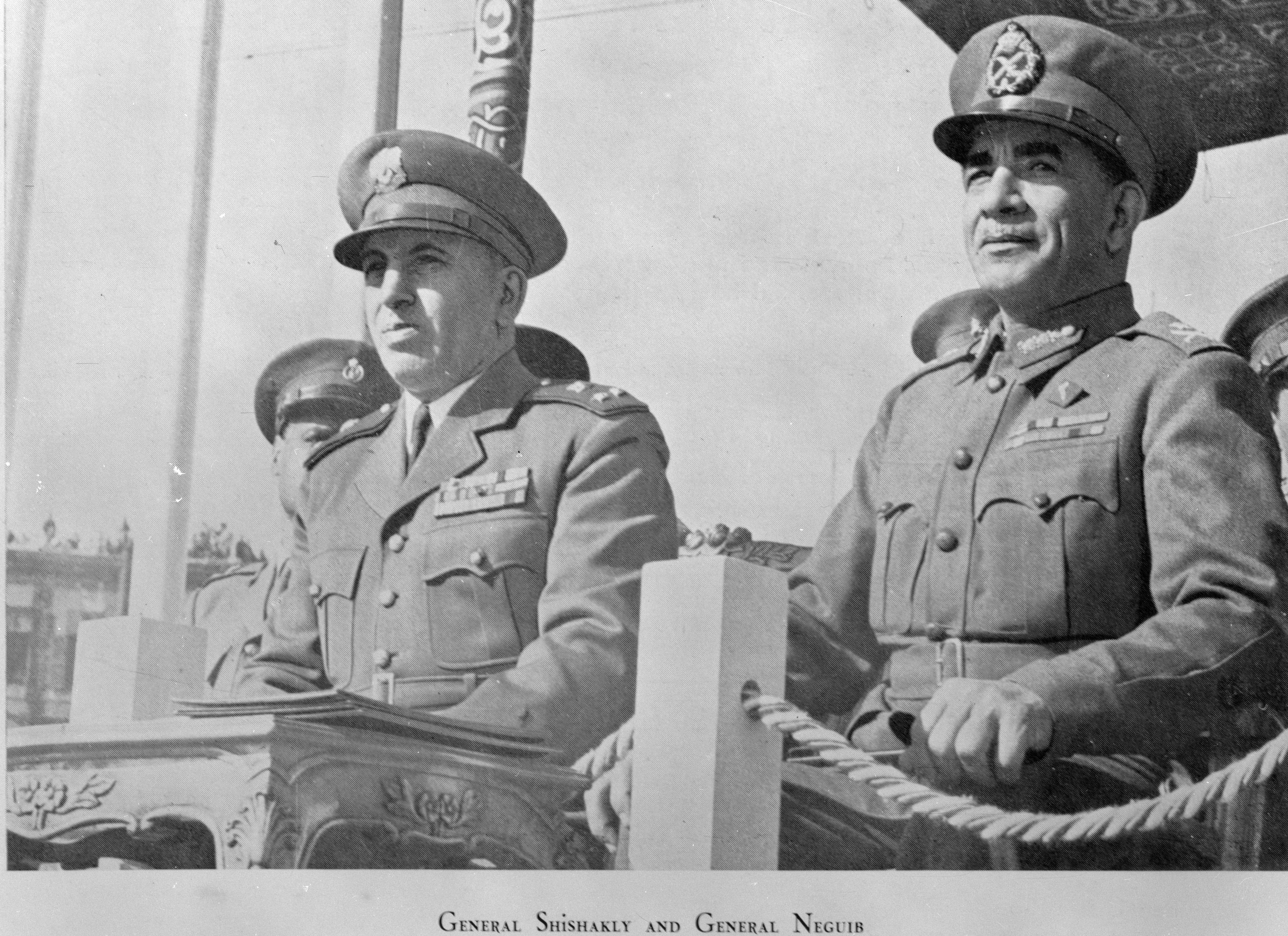 Collectie / Archief : Fotocollectie Van de Poll Reportage / Serie : Reproductiefotografie Beschrijving : Foto van een afbeelding van de Syrische generaal Adib al-Shishakli en de Egyptische generaal Mohamed Neguib Annotatie : Generaal Adib al-Shishakli (1909 - 1964). Generaal Mohamed Neguib (1901-1984) was de eerste Egyptische president na de val van Koning Farouk. Datum : 1 januari 1951 Locatie : Egypte, Syrië Trefwoorden : generaals, uniformen Fotograaf : Poll, Willem van de Auteursrechthebbende : Nationaal Archief Materiaalsoort : Negatief (6x6) Nummer archiefinventaris : bekijk toegang 2.24.14.02 Bestanddeelnummer : 254-3684